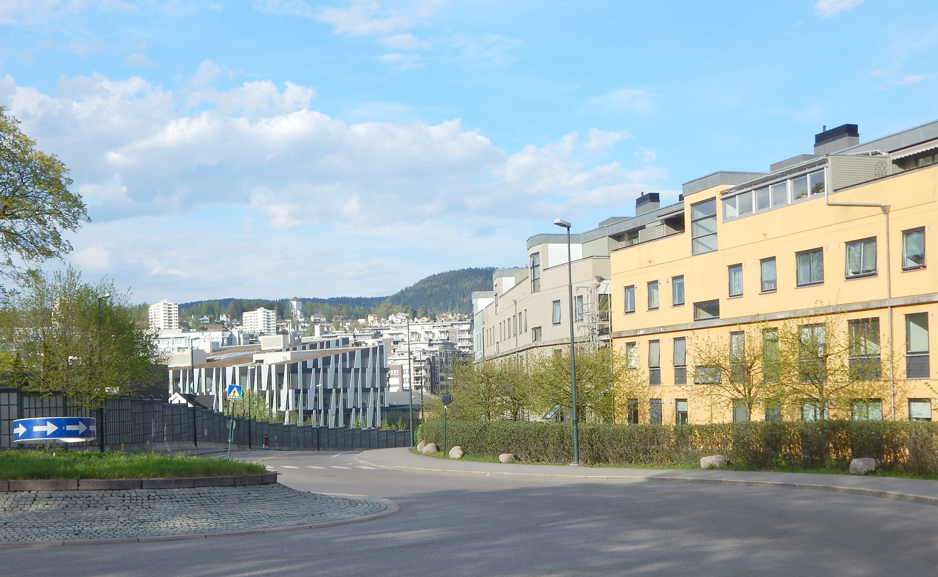 Kristoffer Aamodts gate sett fra Maridalsveien